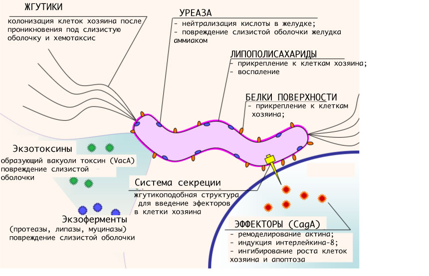 Факторы вирулентности хеликобактера